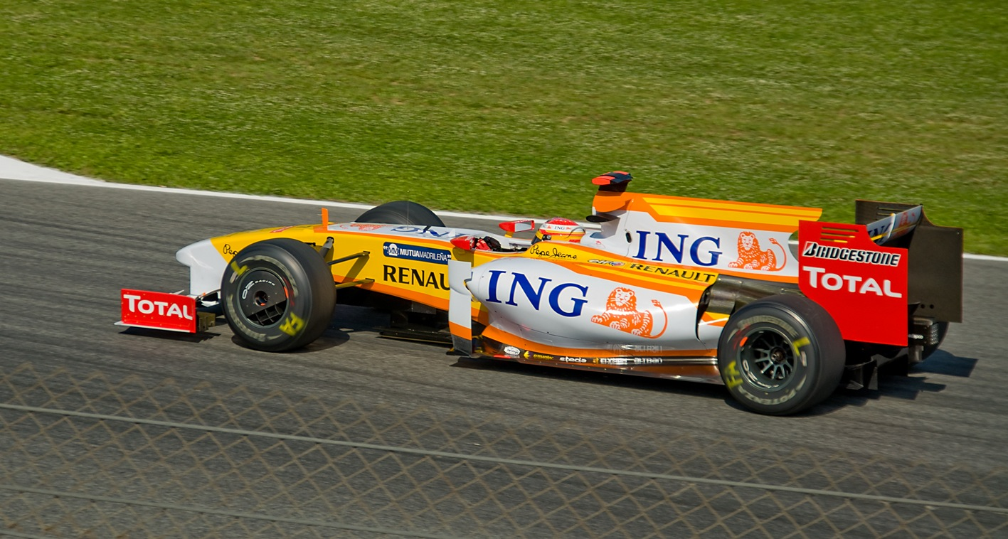 Nikon D90 + Sigma 18-200 DC OS HSM 1/800s - F/7.1 - 116mm - ISO200